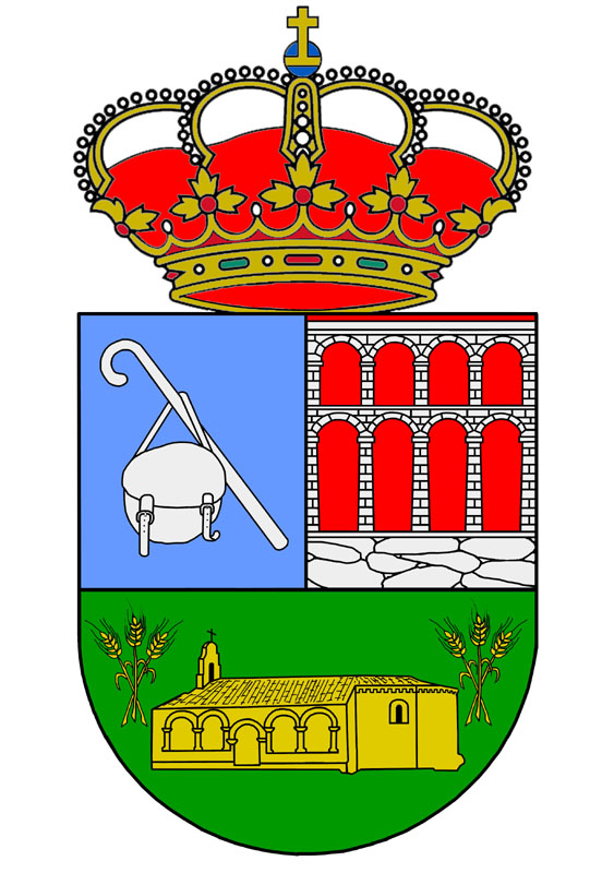 Escudo municipal de Villoslada de la Trinidad